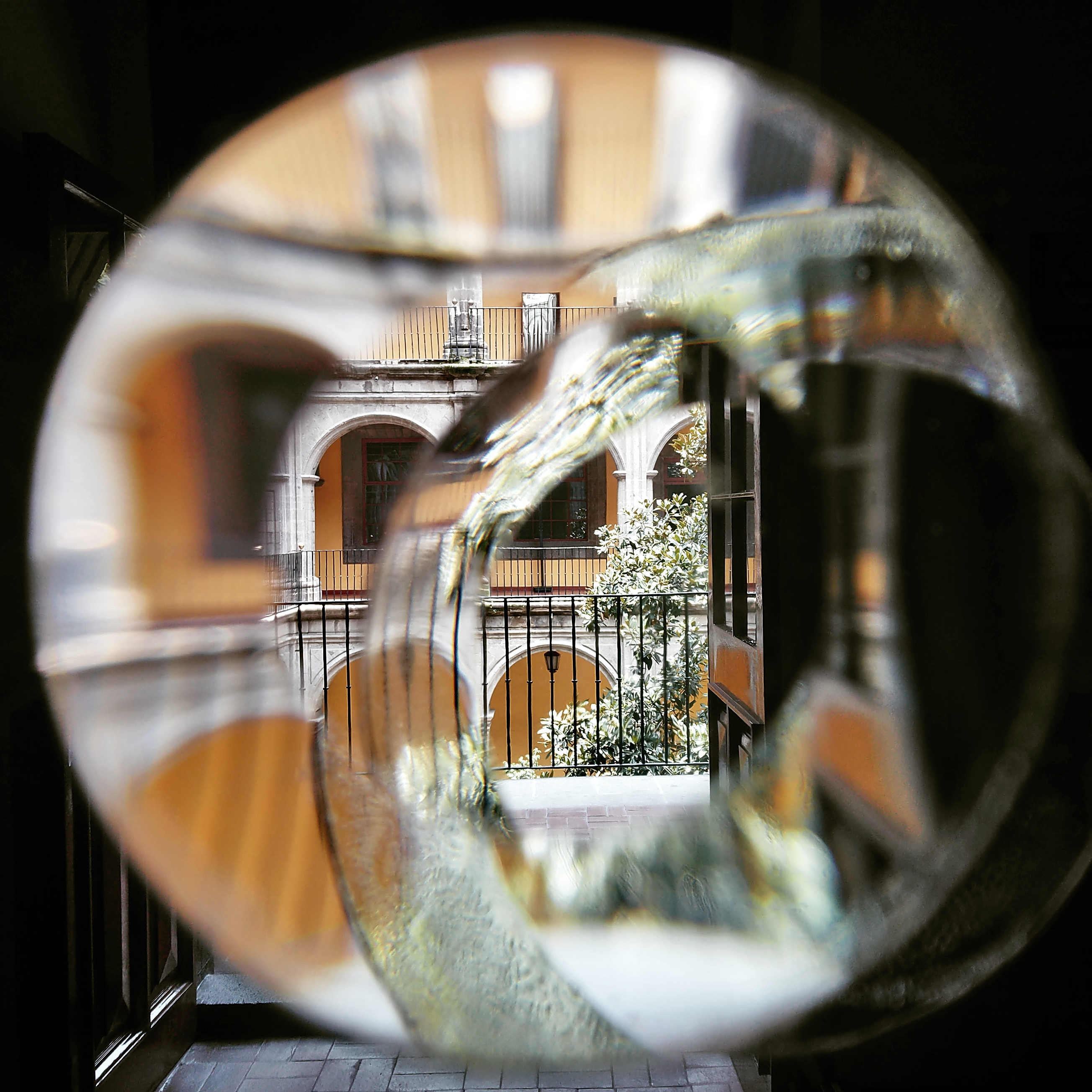 "La Luna" de Narcissuso Quagliata